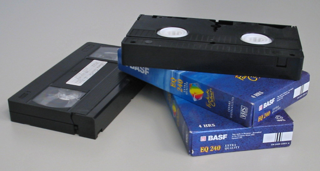 VHS videobanden en opbergdozen